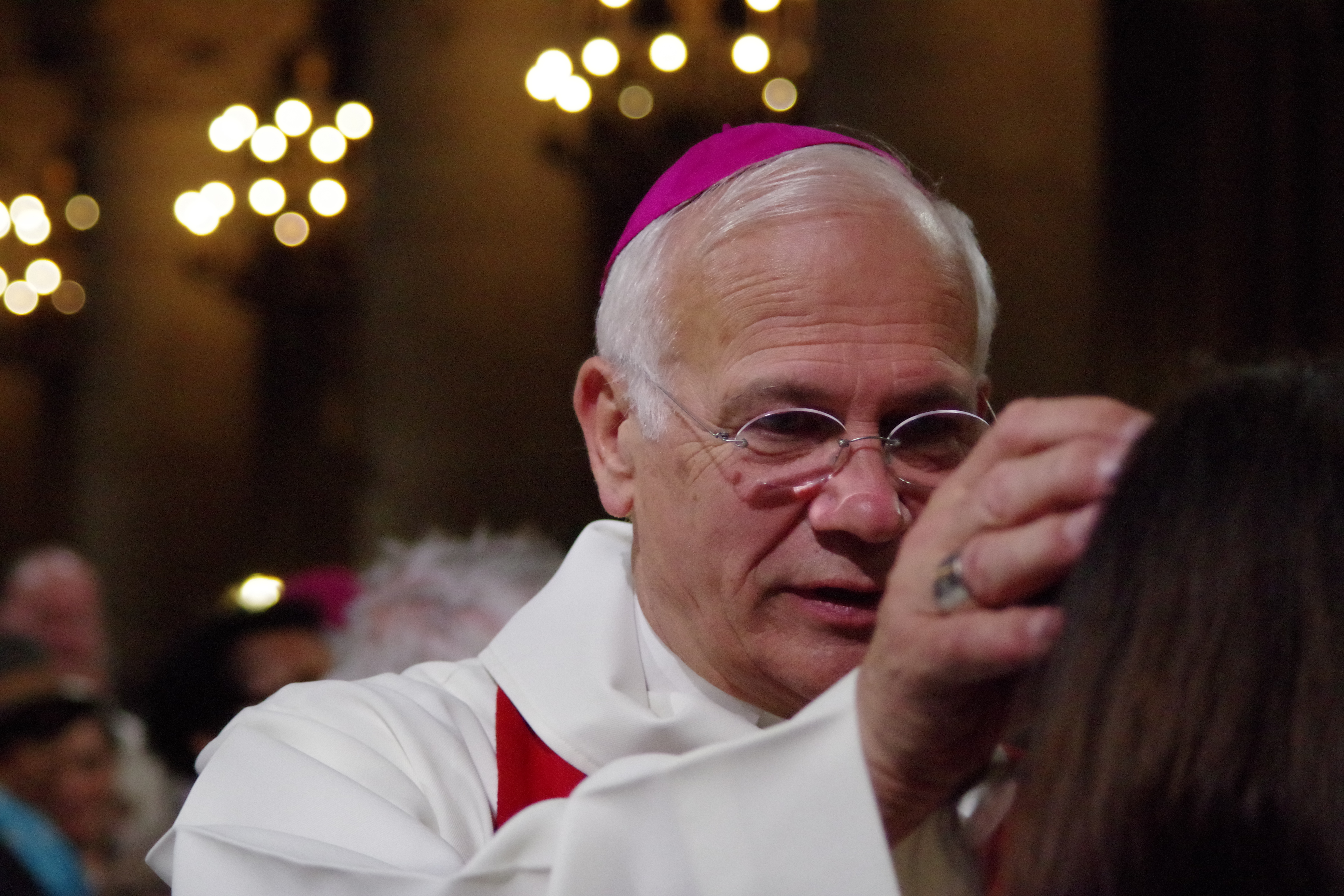 Mgr Lalanne bénissant un fidèle à la veillée pour la vie en mai 2015 en la cathédrale Notre-Dame-de-Paris